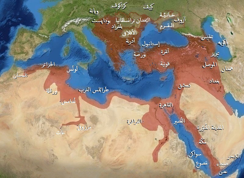 خارطة تُبيِّن أقصى اتساع بلغته الدولة العُثمانيَّة أواخر القرن السادس عشر الميلادي.